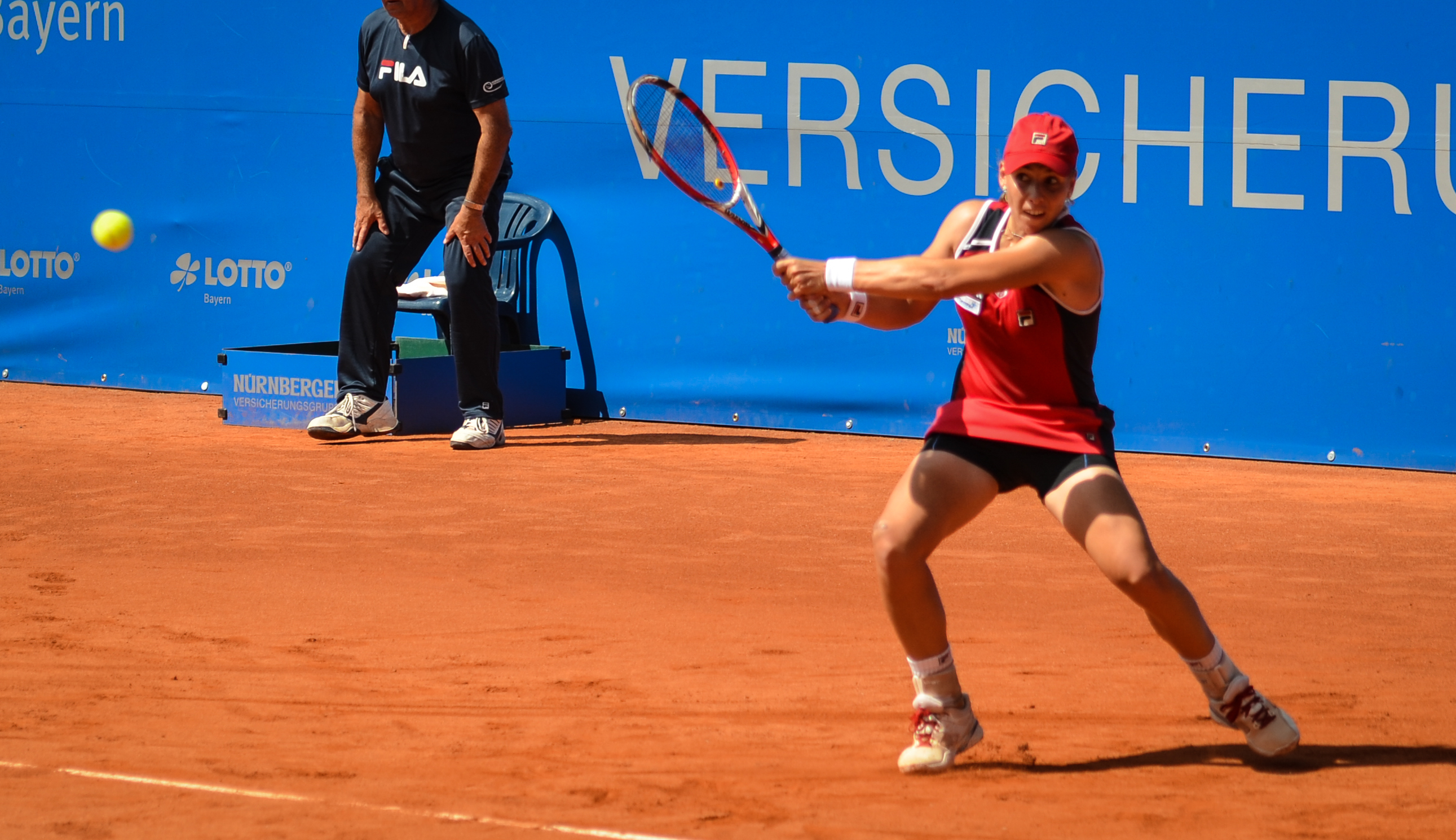 Marina Erakovic during her 1st round match against Angelique Kerber at the 2014 Nürnberger Versicherungscup on May 20, 2014